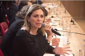 Deputada Federal Rosana Valle segurando um microfone enquanto discursa em reunião do partido